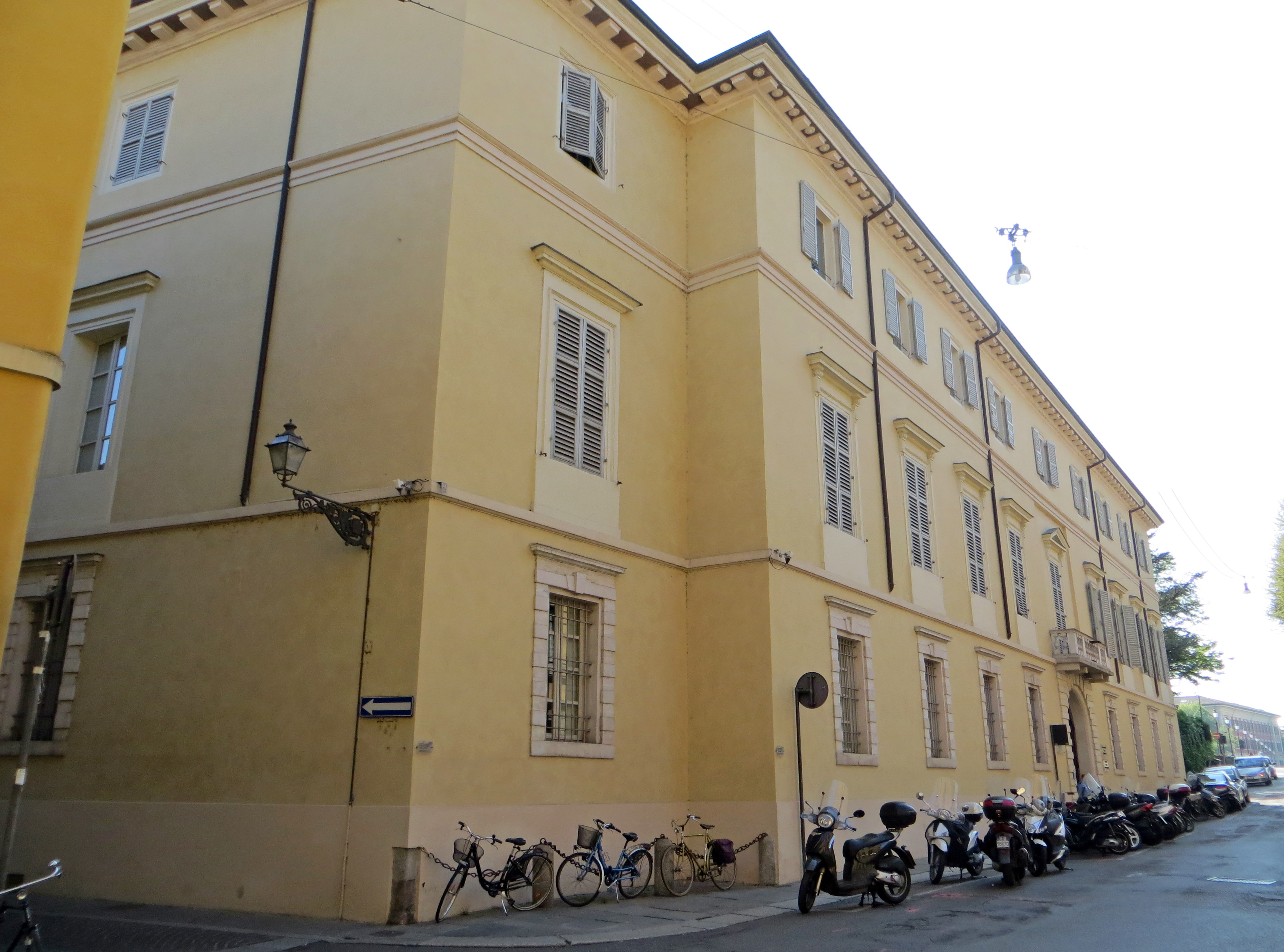 Palazzo Soragna - facciata